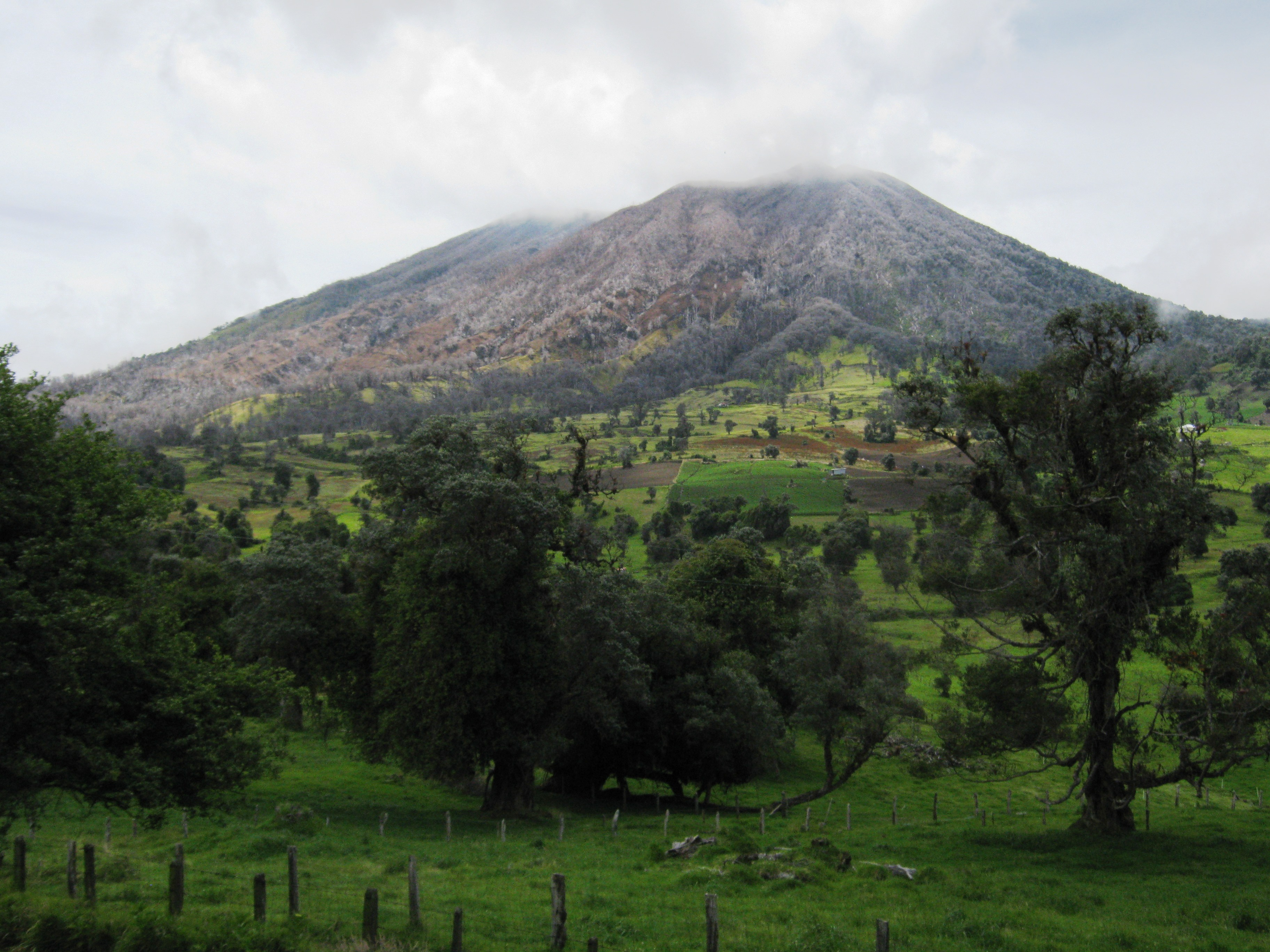 Vegetacion dañada por lluvia ácida